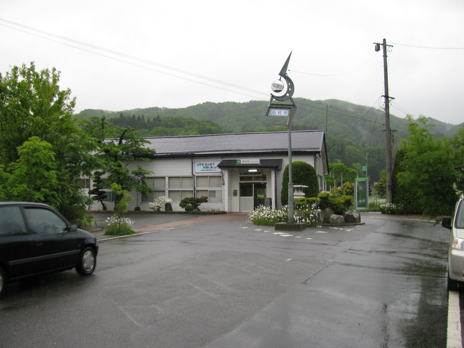 水郡線菅谷駅